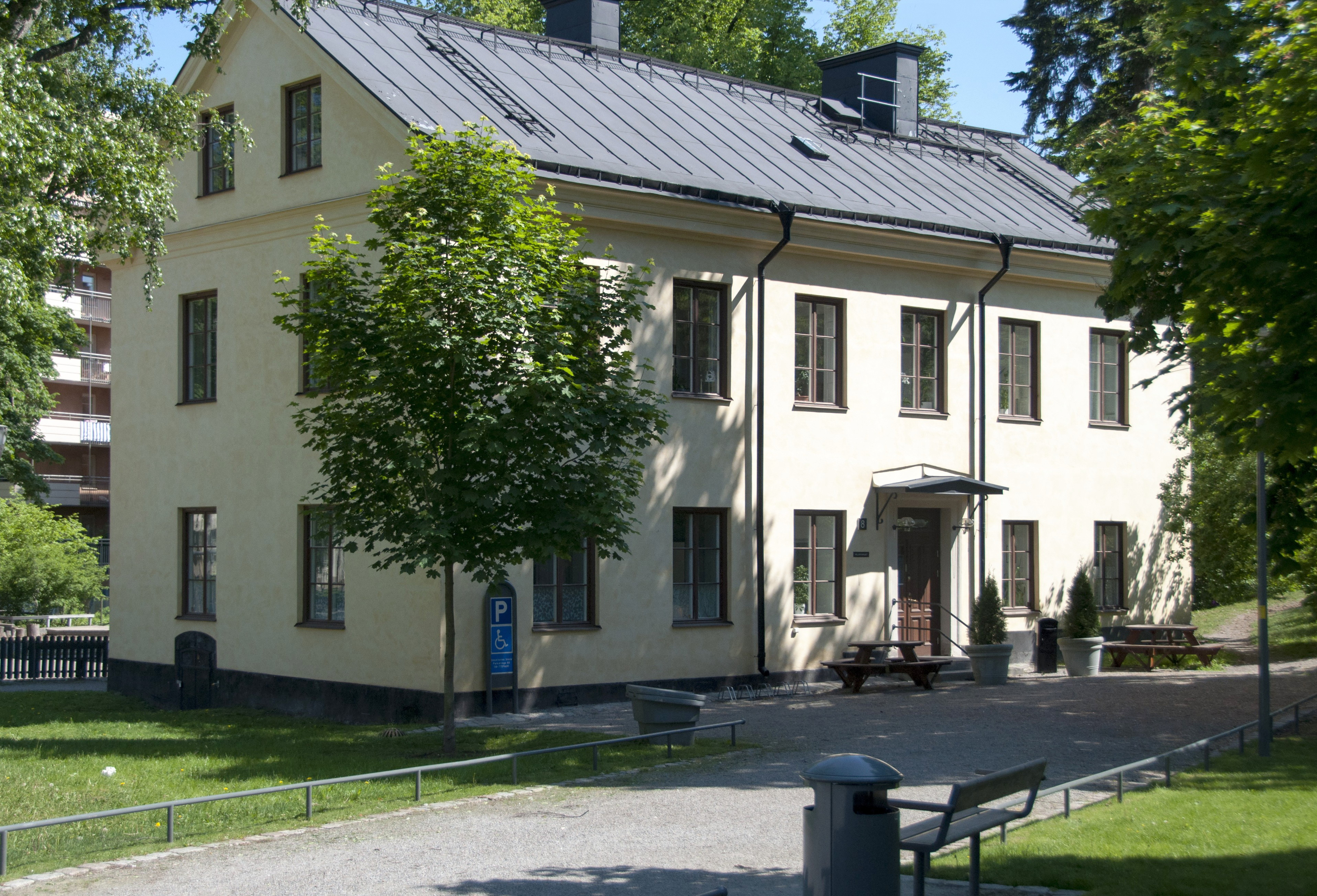 Sysslomansbostaden, Sabbatsberg. Nybyggnadsår 1824 - 1827